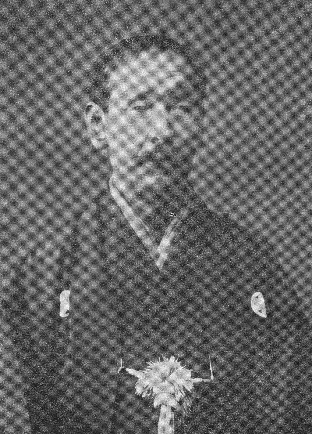 Portrait of Nakazawa Hikokichi (中沢彦吉, 1839 – 1912)